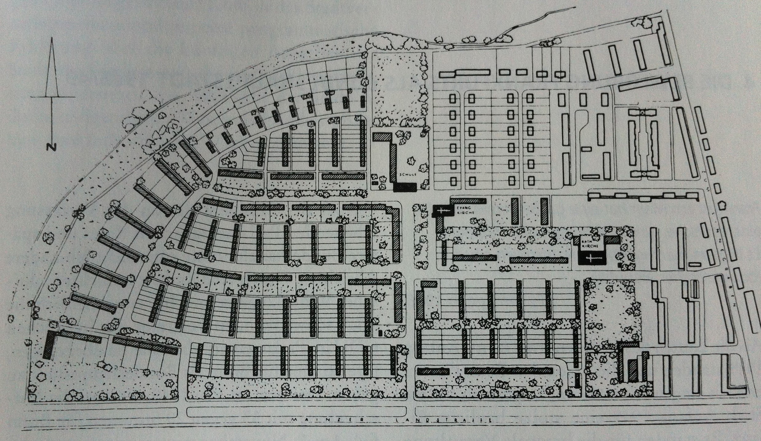 Bizonale Siedlung in Frankfurt-Griesheim-Nord von ca. 1948, Übersichtsplan